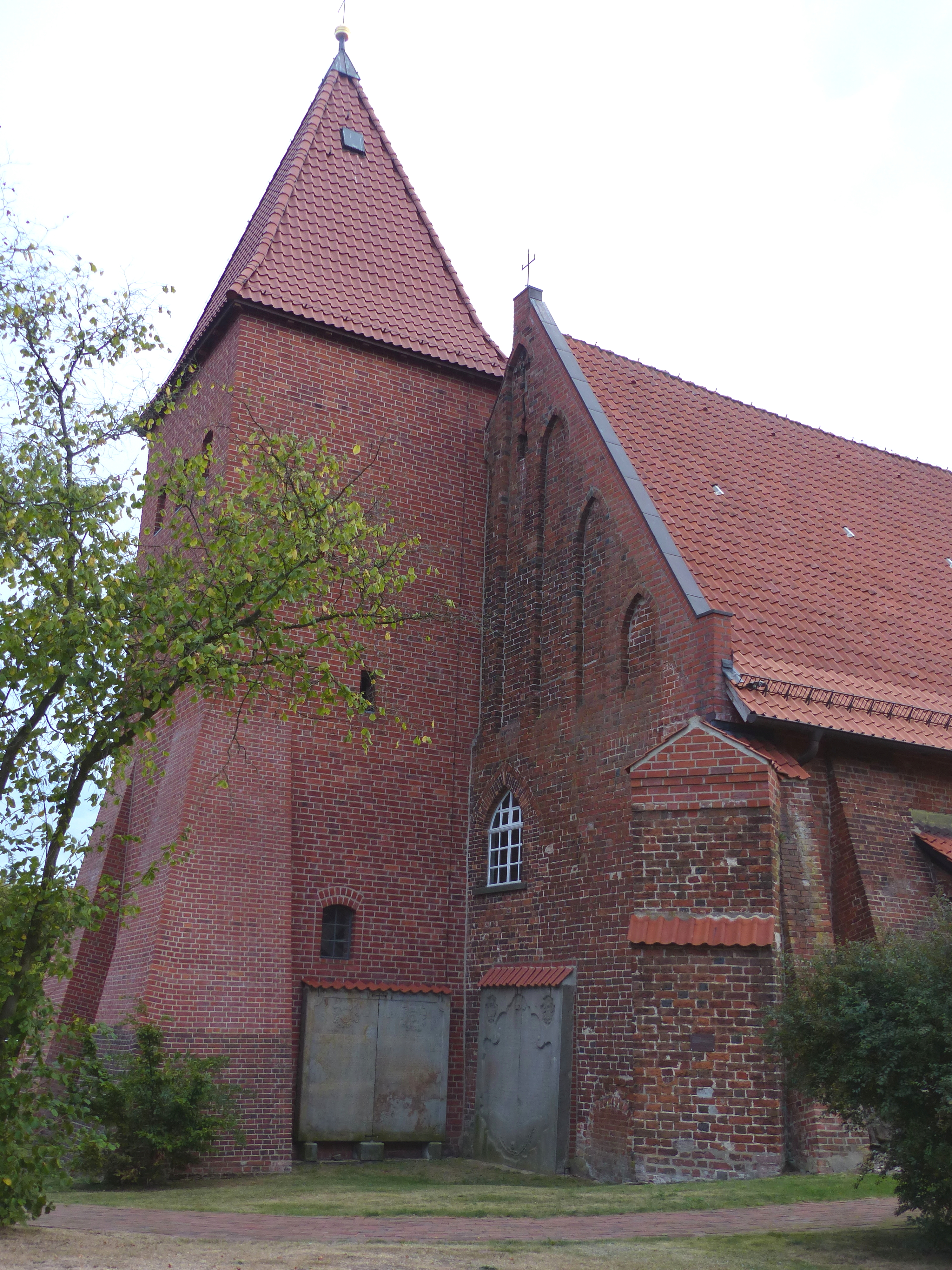 Westgiebel der Johanneskirche in Drakenburg von Süden